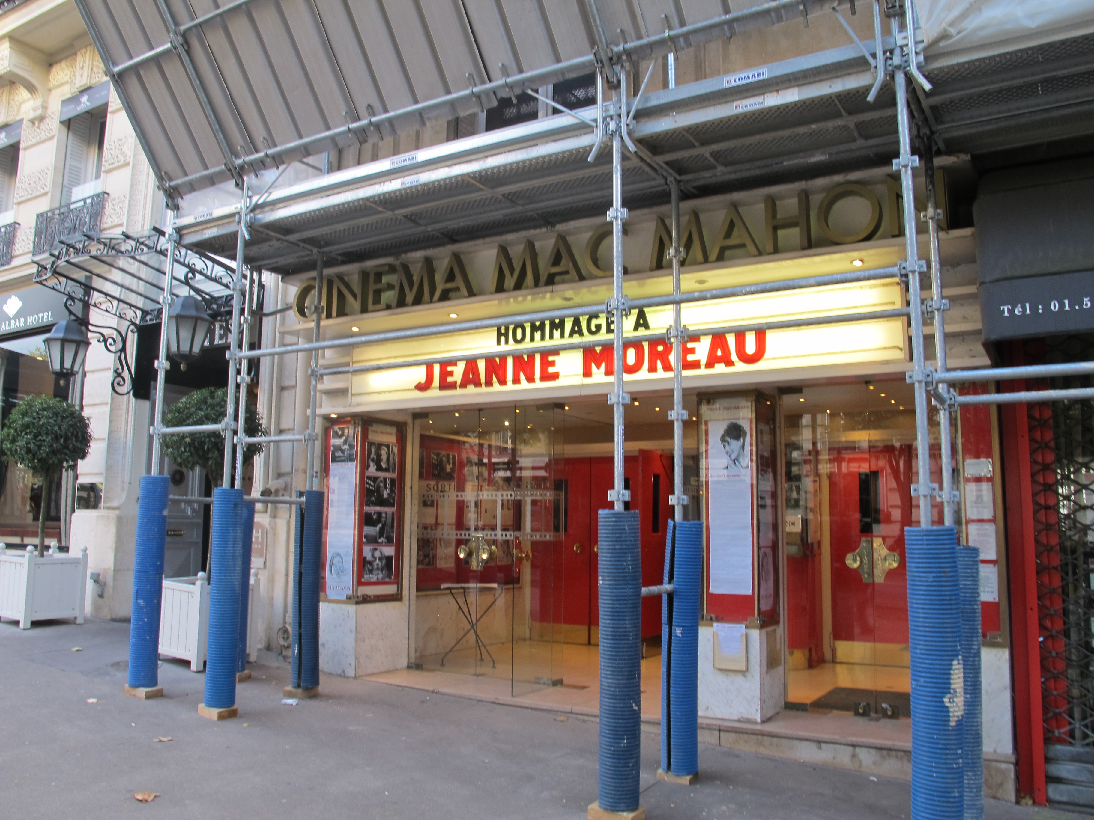 Façade du cinéma Mac Mahon, 5 de l'avenue Mac-Mahon (Paris, 17e). "Hommage à Jeanne Moreau" en devanture", quelques semaines après sa mort.